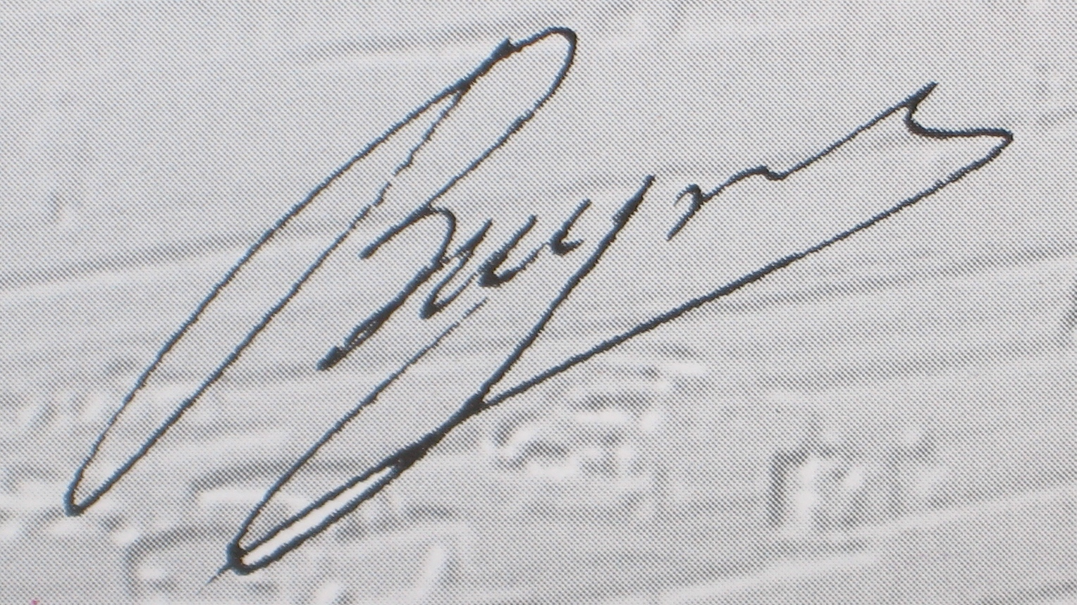 Жуков, Валентин Васильевич - первый президент ВФВ (Всеросс. Федерации волейбола). Подпись на обращении к участникам международного волейбольного турнира в Москве, июнь 1997. Soviet sportsmen Valentin Zhukov signature (1997).